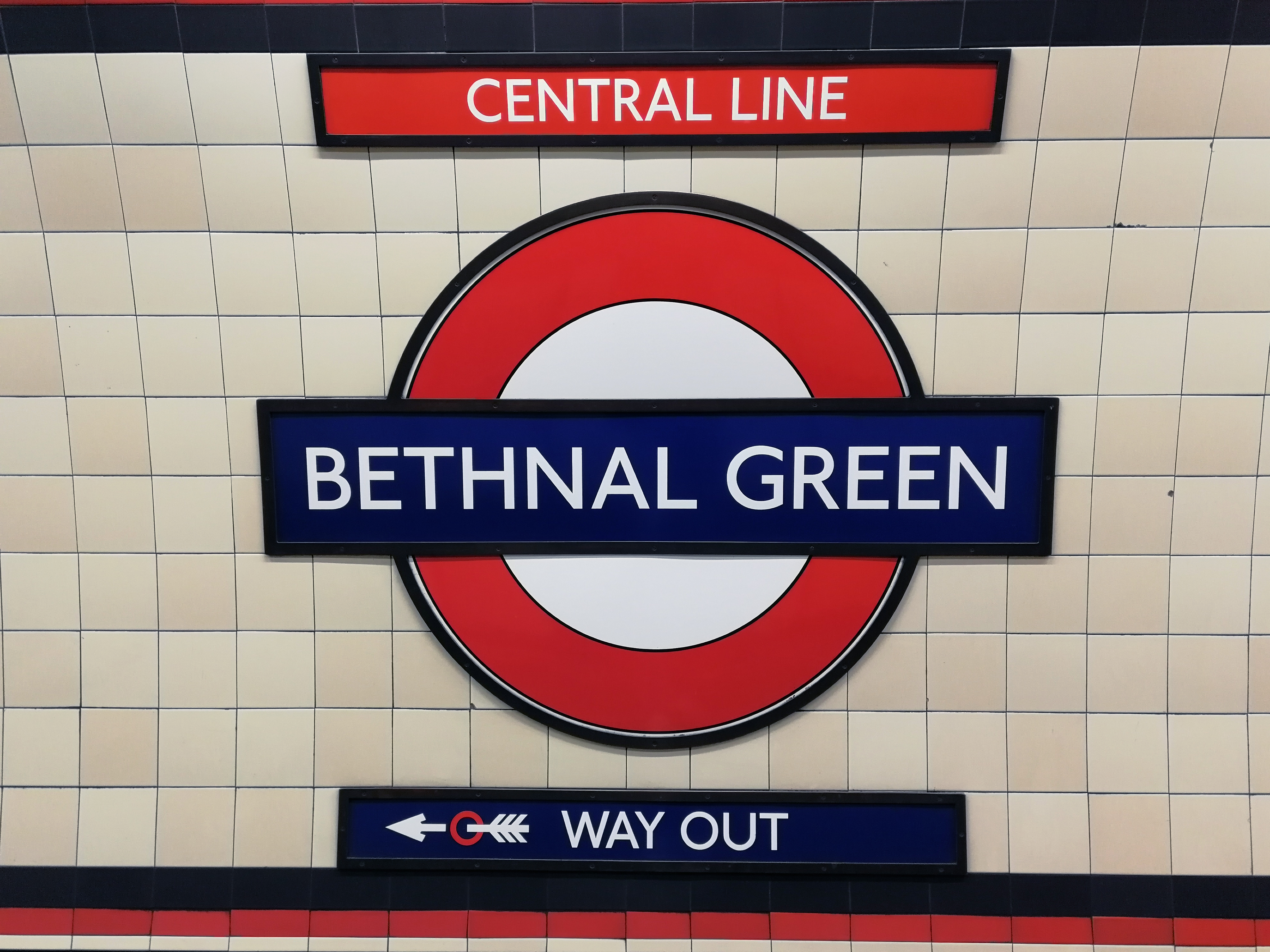 Panneau indiquant le nom de la station Bethnal Green, Central Line, Way out (sortie)